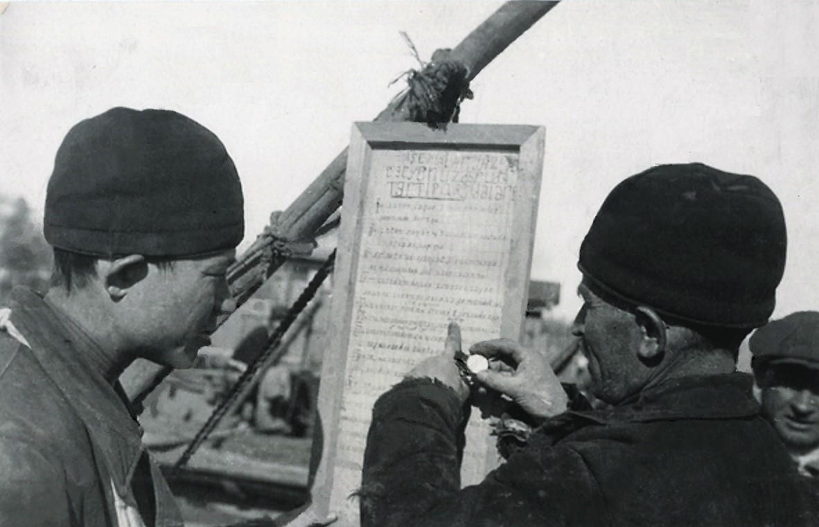 Татарстан. Бригадир 6-ой бригады Гатдрашитов Шайхий указывает колхознику Галимову время его работы по расписанию